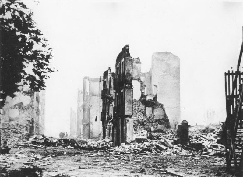 Die Ruinen von Guernica 5603/37